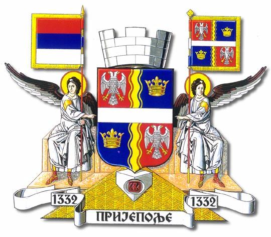 Coat of arms of Prijepolje, Serbia/Blason de la ville de Prijepolje, Serbie